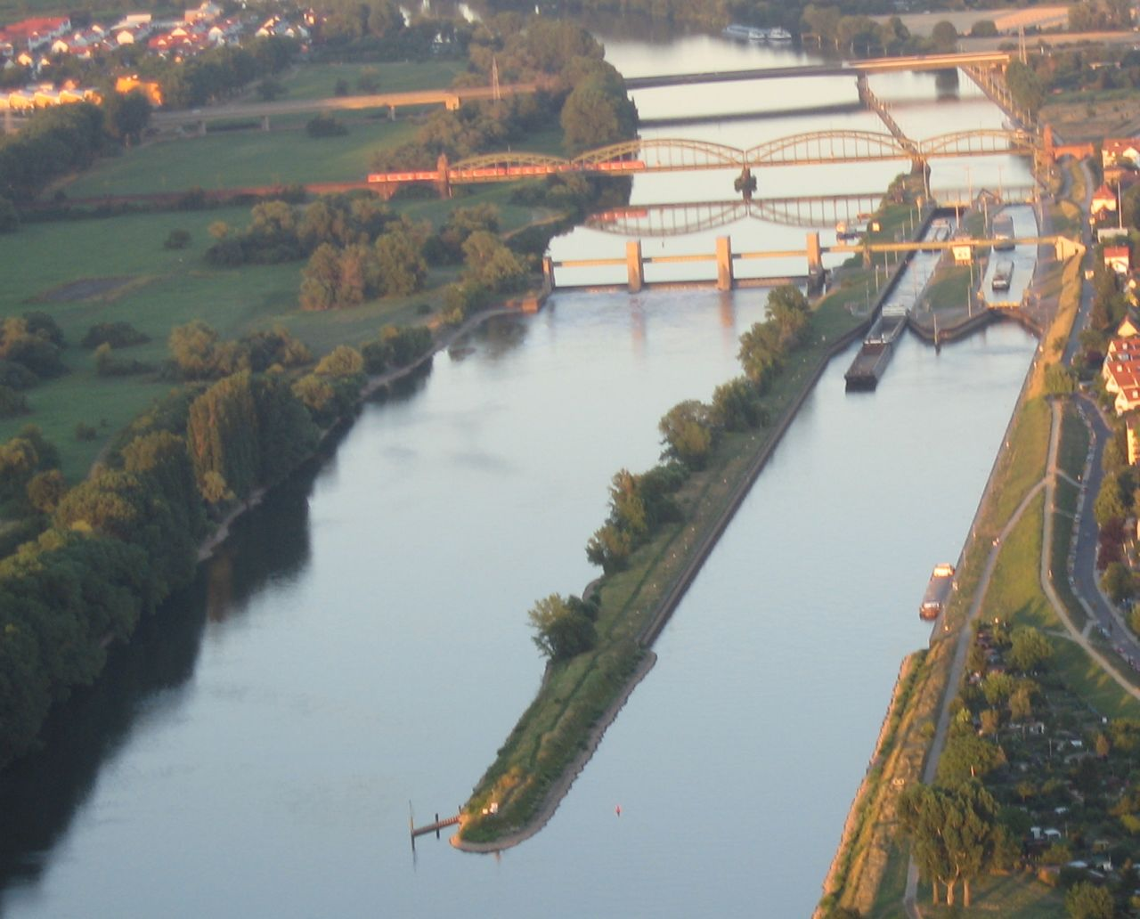 Die erste Schleuse - von der Mündung aus - des Mains "Mz-Kostheim", die aber auf der Gemarkung Hochheim und Gustavsburg liegt.